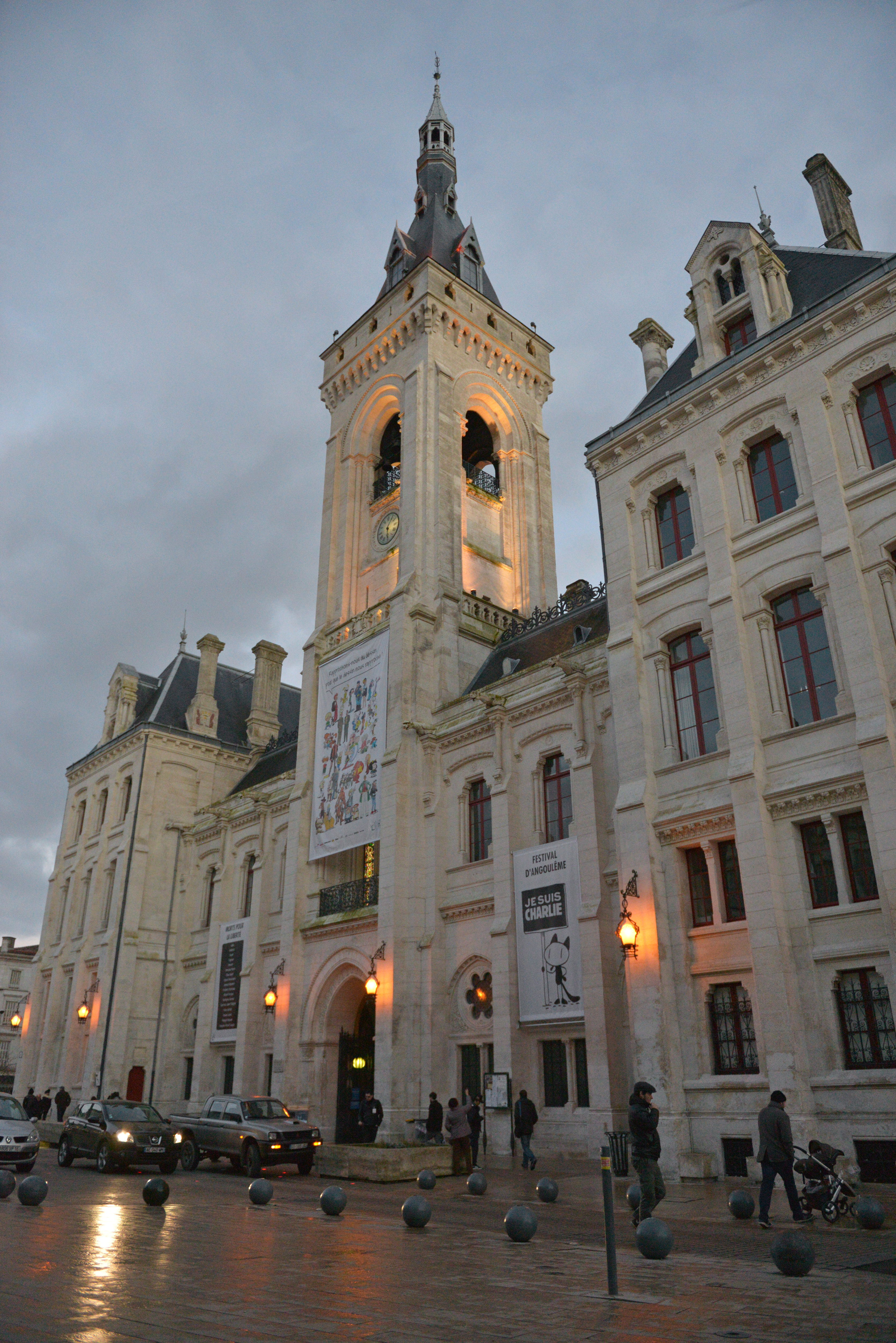 Hôtel de ville d'Angoulême le dernier jour du 42e Festival d'Angoulême.